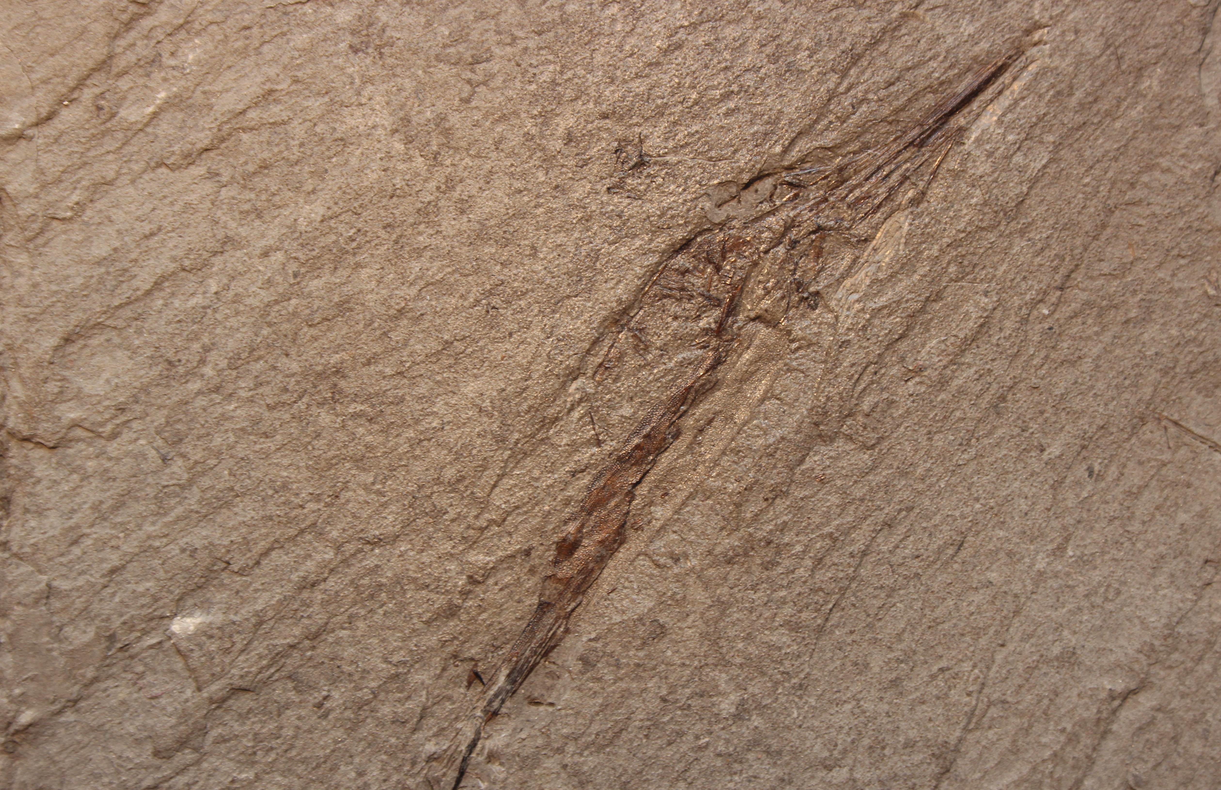 Familie: Schnepfenfisch (Centriscidae) Fossil Fundort: Tongrube Wiesloch Deutschland Formation: letzter Meeresvorstoß in Deutschland Links unten Schwanzflosse, rechts oben Kopfseite.